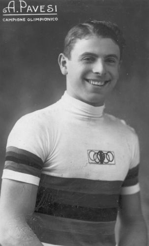 Attilio Pavesi